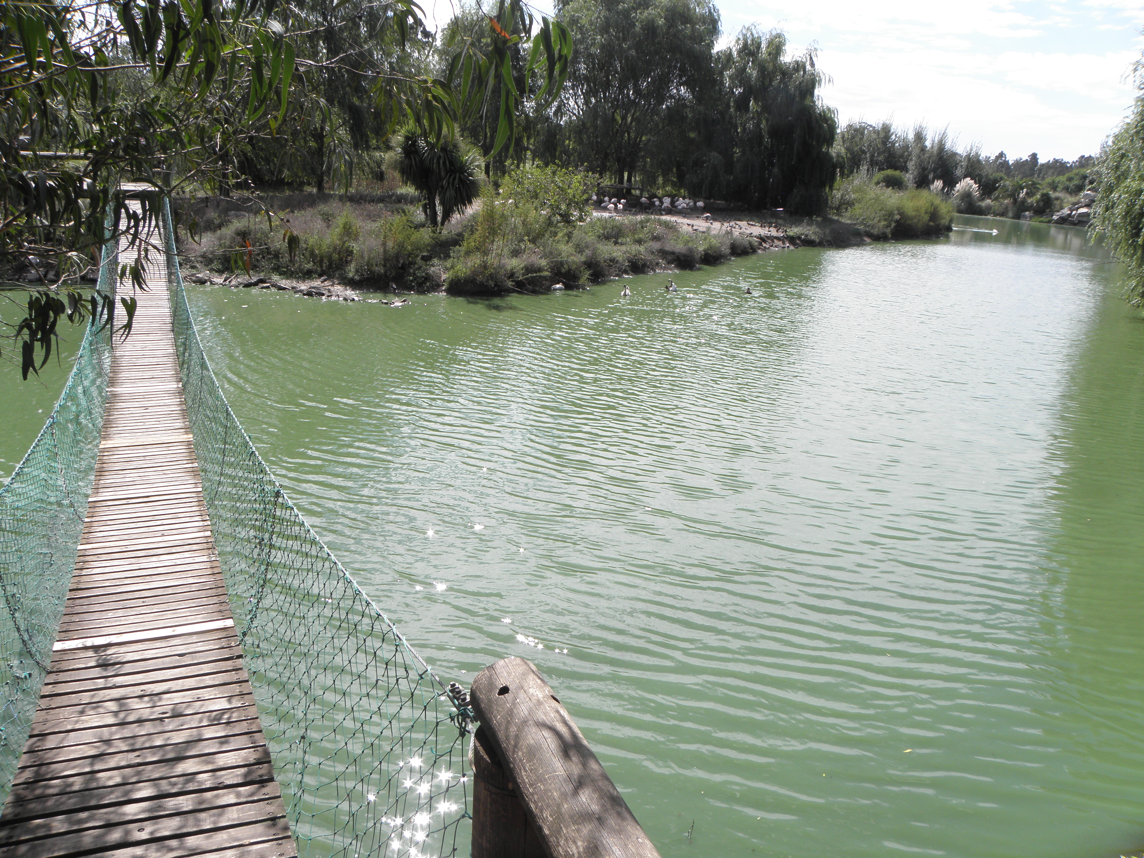 Zoológico de Batán, provincia de Buenos Aires, Argentina.